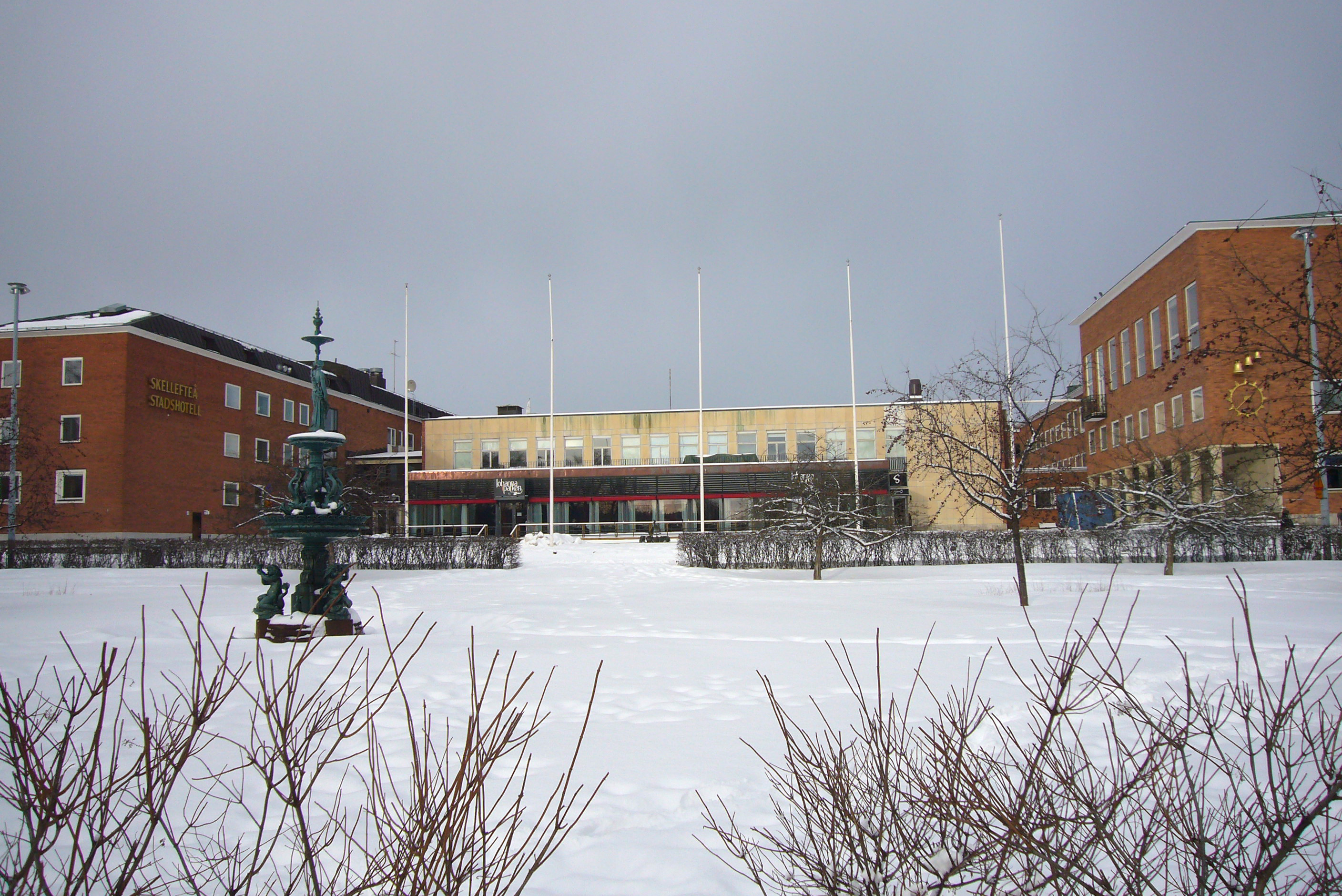 kv Hjorten; Skellefteå stadshotell, statyn Johanna i parken framför krogen Johanna i Parken samt gamla stadshuset Hjorten